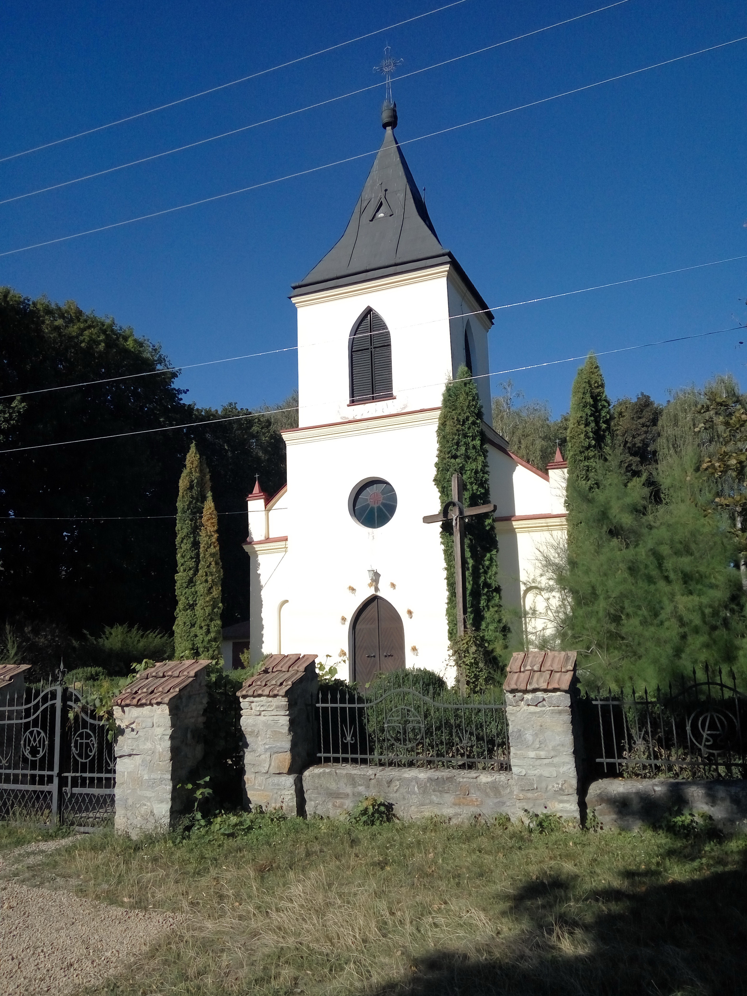 Новозбудований римо-католицький храм Христа-Царя Всесвіту